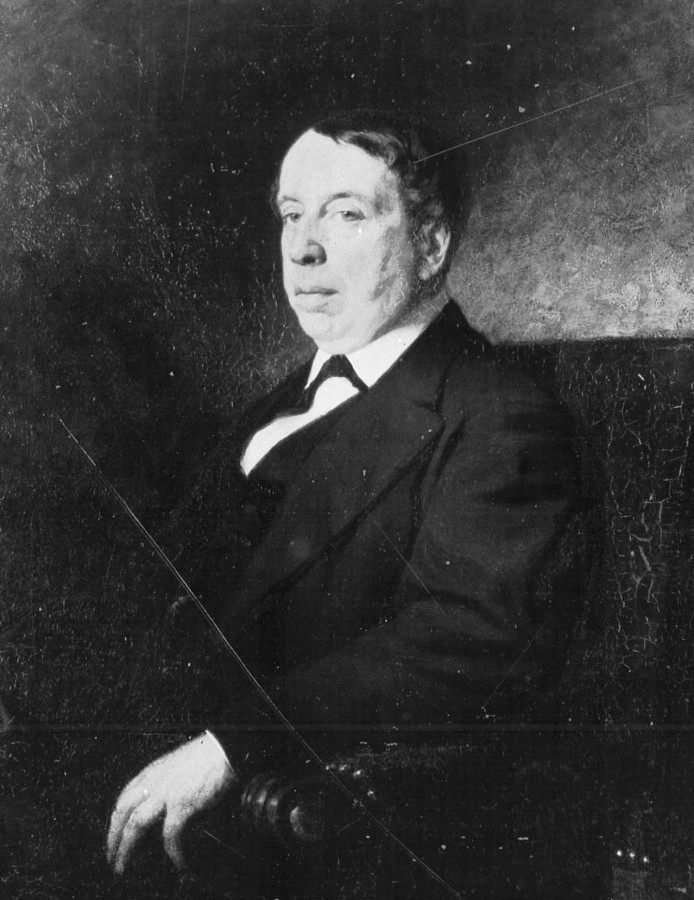 Dagobert Oppenheim (1809-1889), Unternehmer, Kunstmäzen und Zeitungsverleger